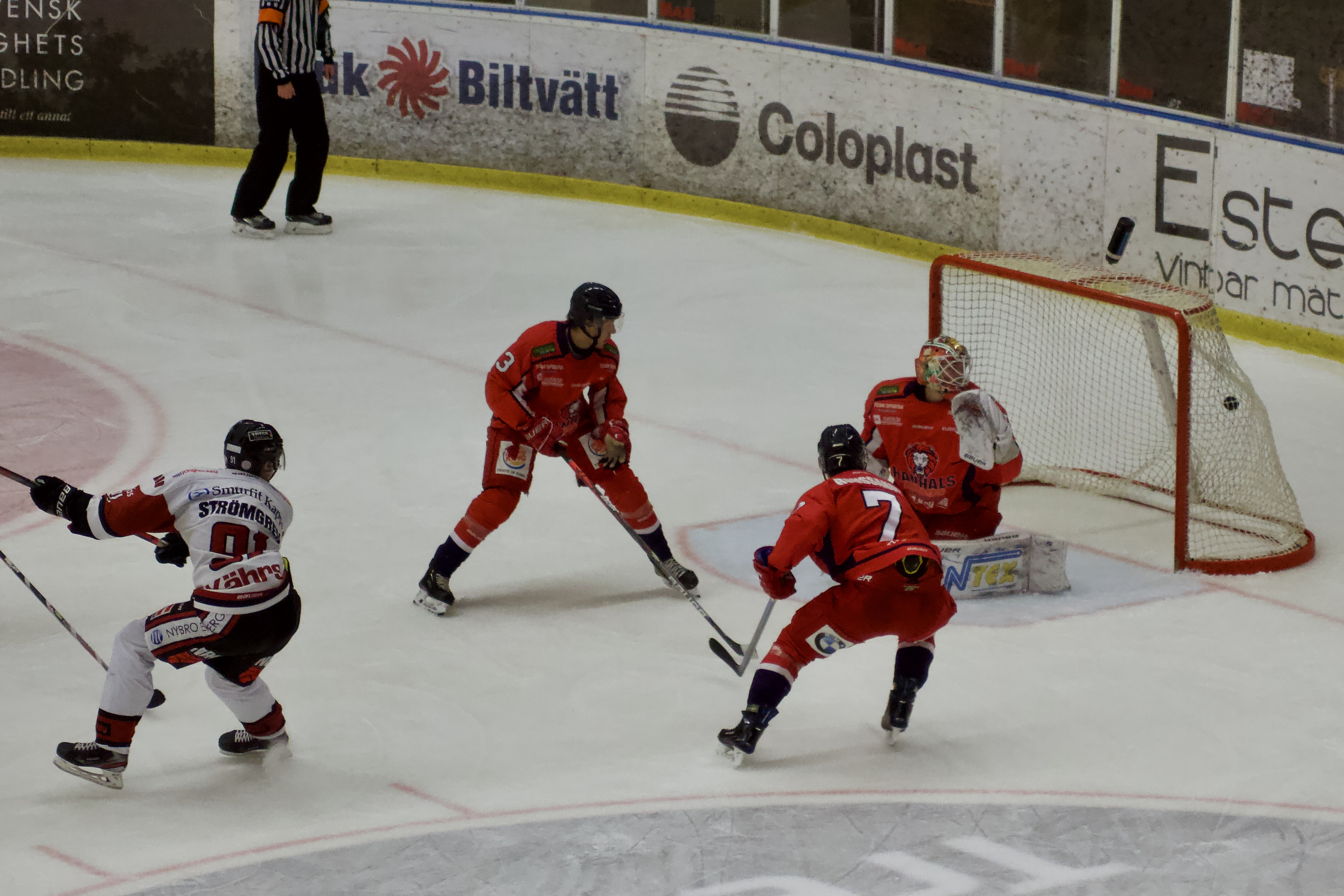 Matchinfo